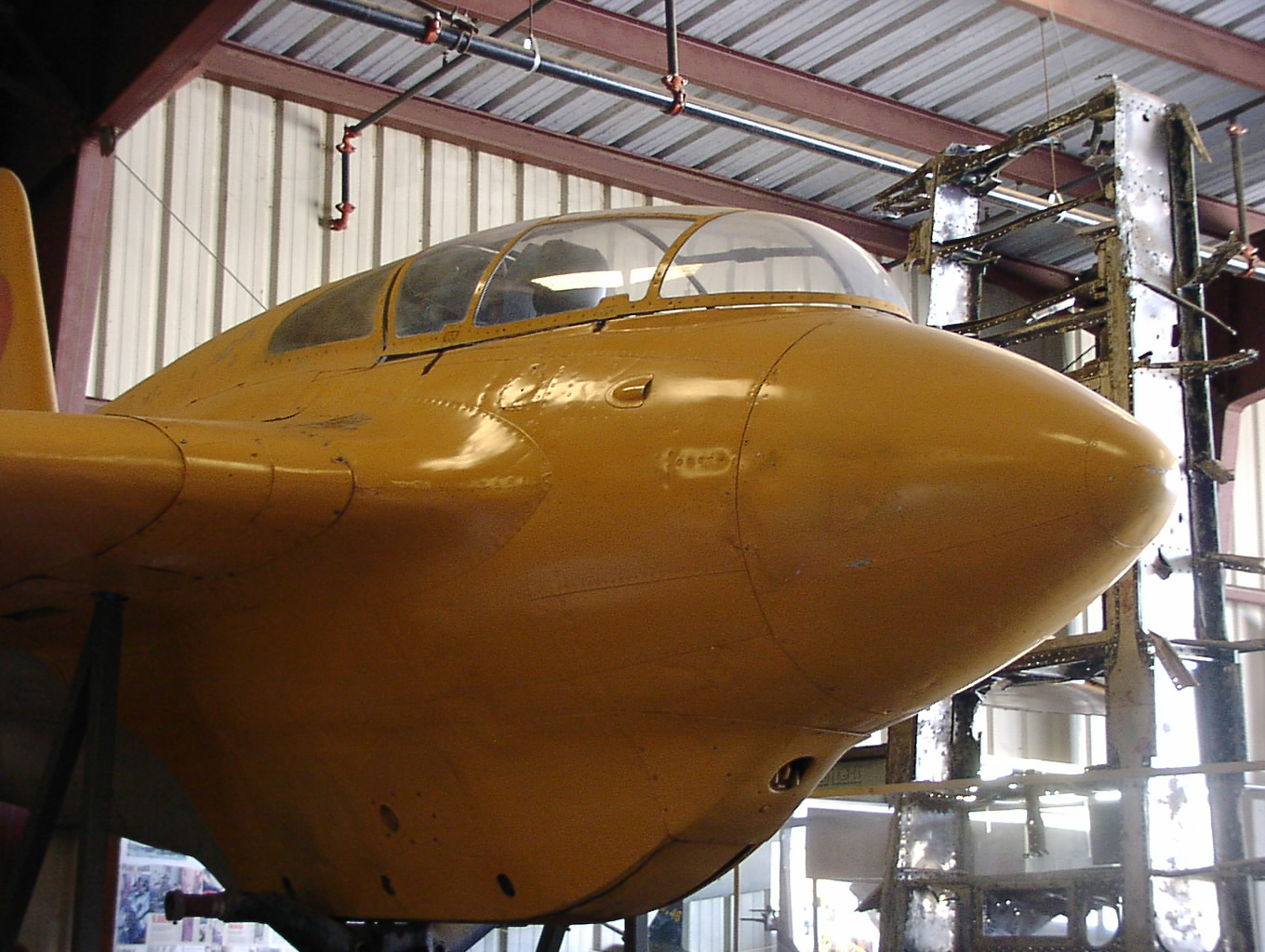 (( Description Planes of Fame J8M1_Shu_Sui.JPG Date05/Sep/2008SourceStatic Displayed of Planes of FameAuthorSekinei Sekineiが撮影 )) Planes of Fame J8M1_Shu_Sui.JPG